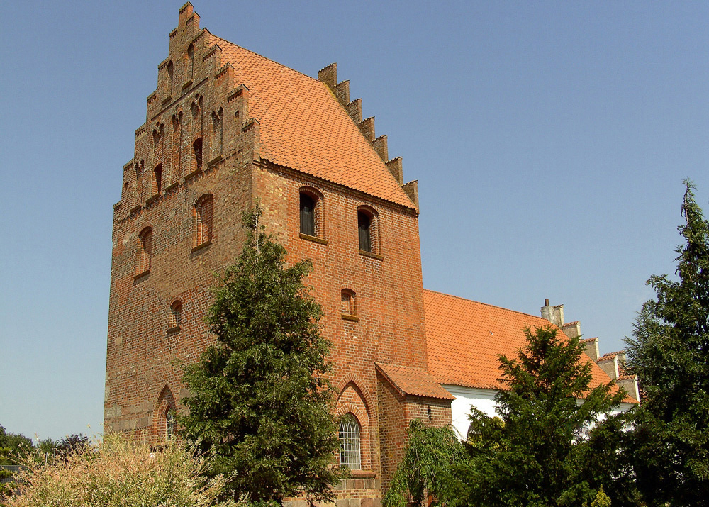 fra sydvest